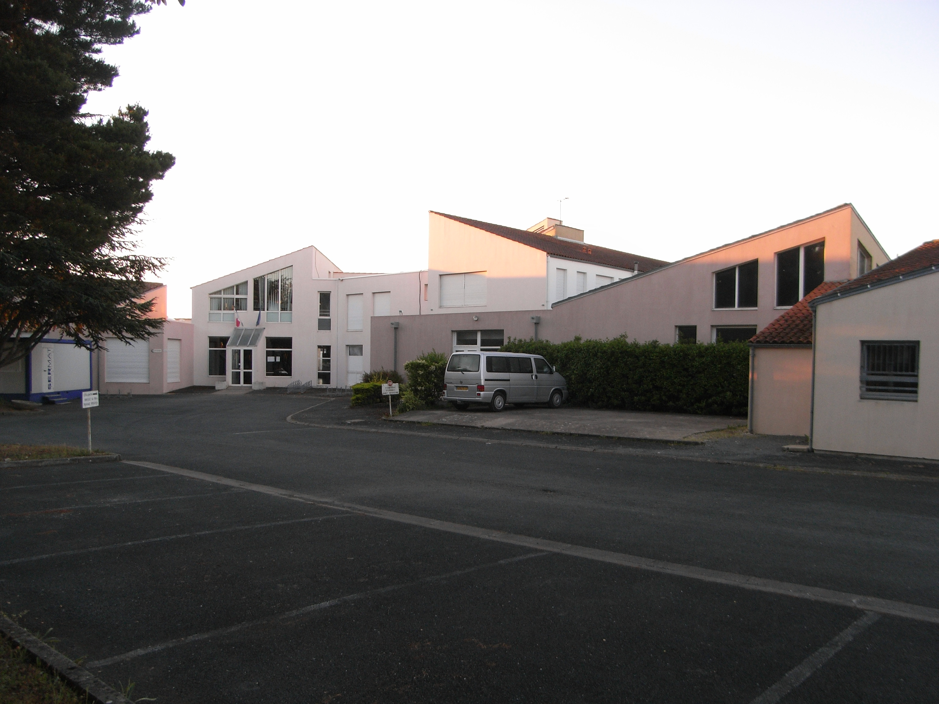 Collège publique "Françoise Dolto" à La Jarrie, commune de Charente-Maritime (France)